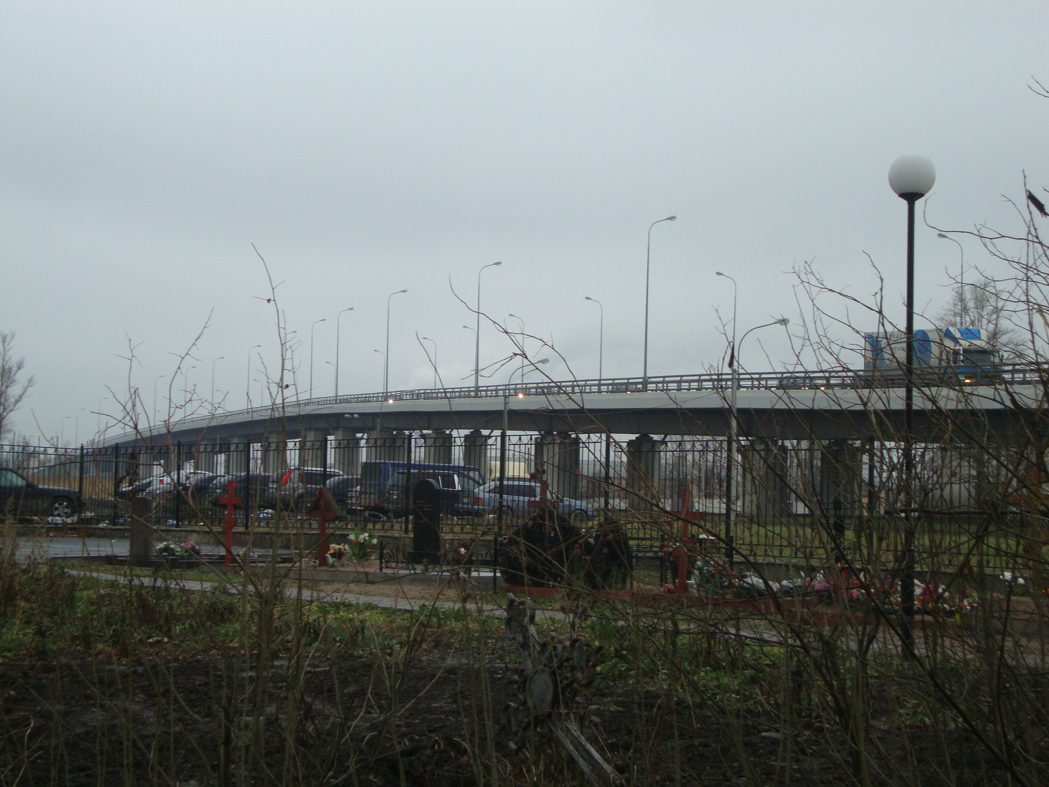 Митрофаньевский путепровод (вид с Громовского кладбища, 2014)